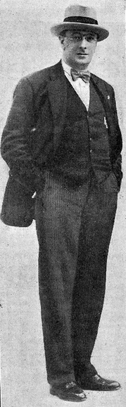 Joaquín Martín Martínez, fotografía en Vida Gallega 1929